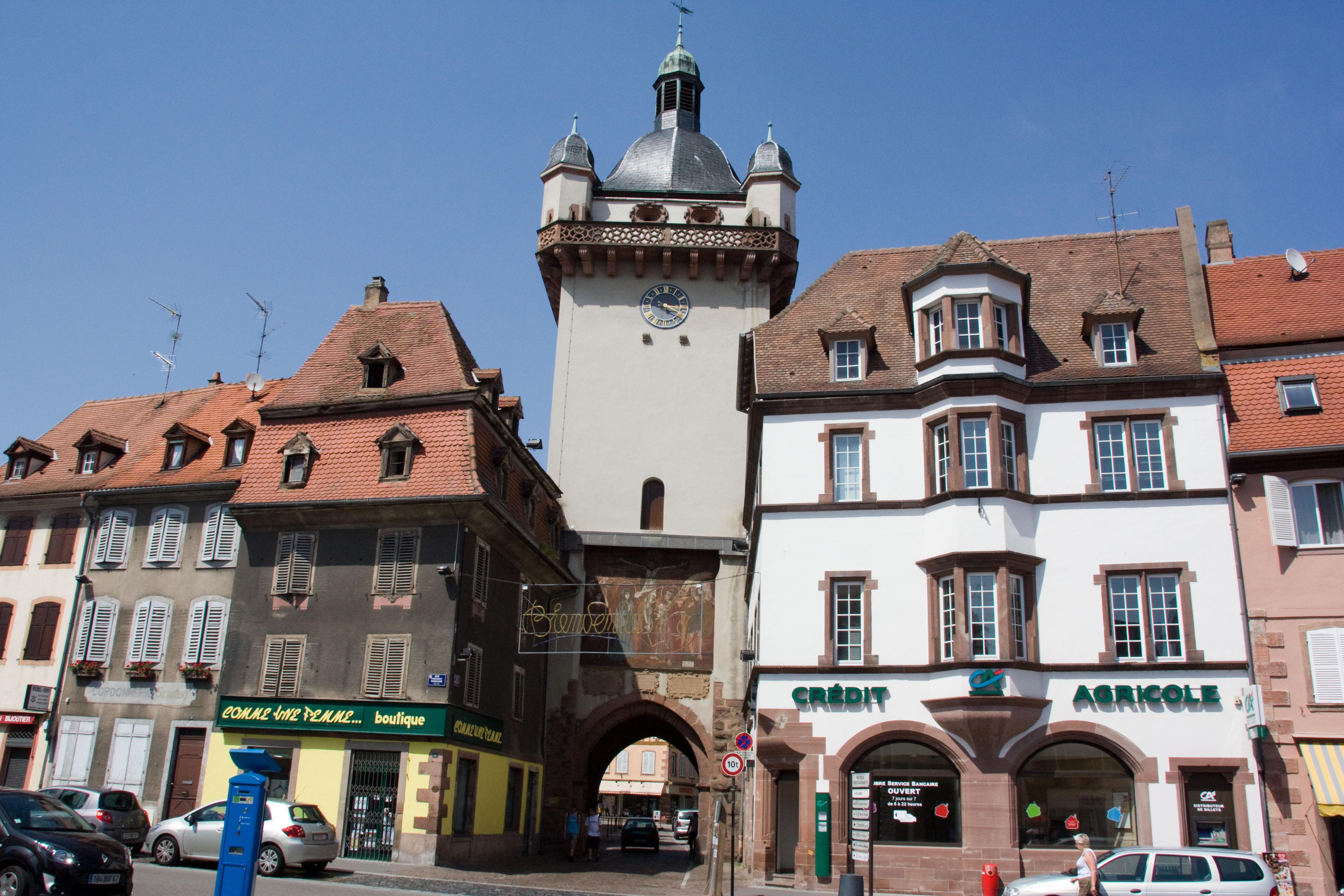 Sélestat, Bas-Rhin (Alsace, France).